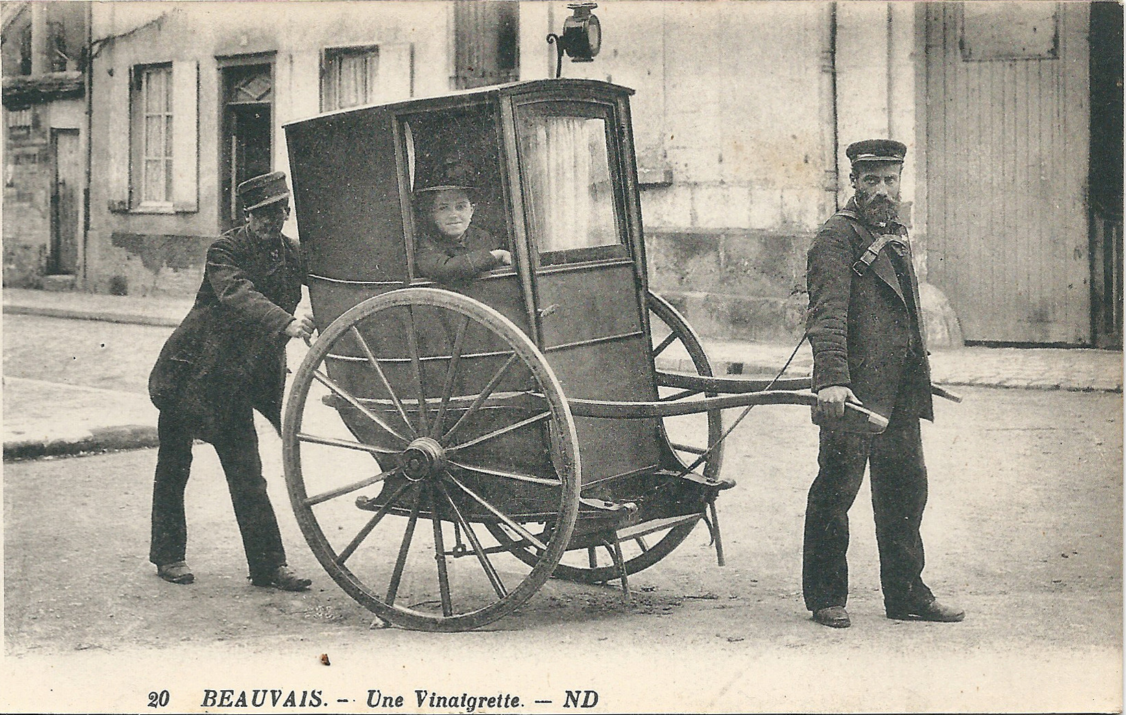 Carte postale ancienne de Beauvais (Oise, France) ; une vinaigrette, sorte d'hybride entre la chaise à porteur et la brouette (à 2 roues).